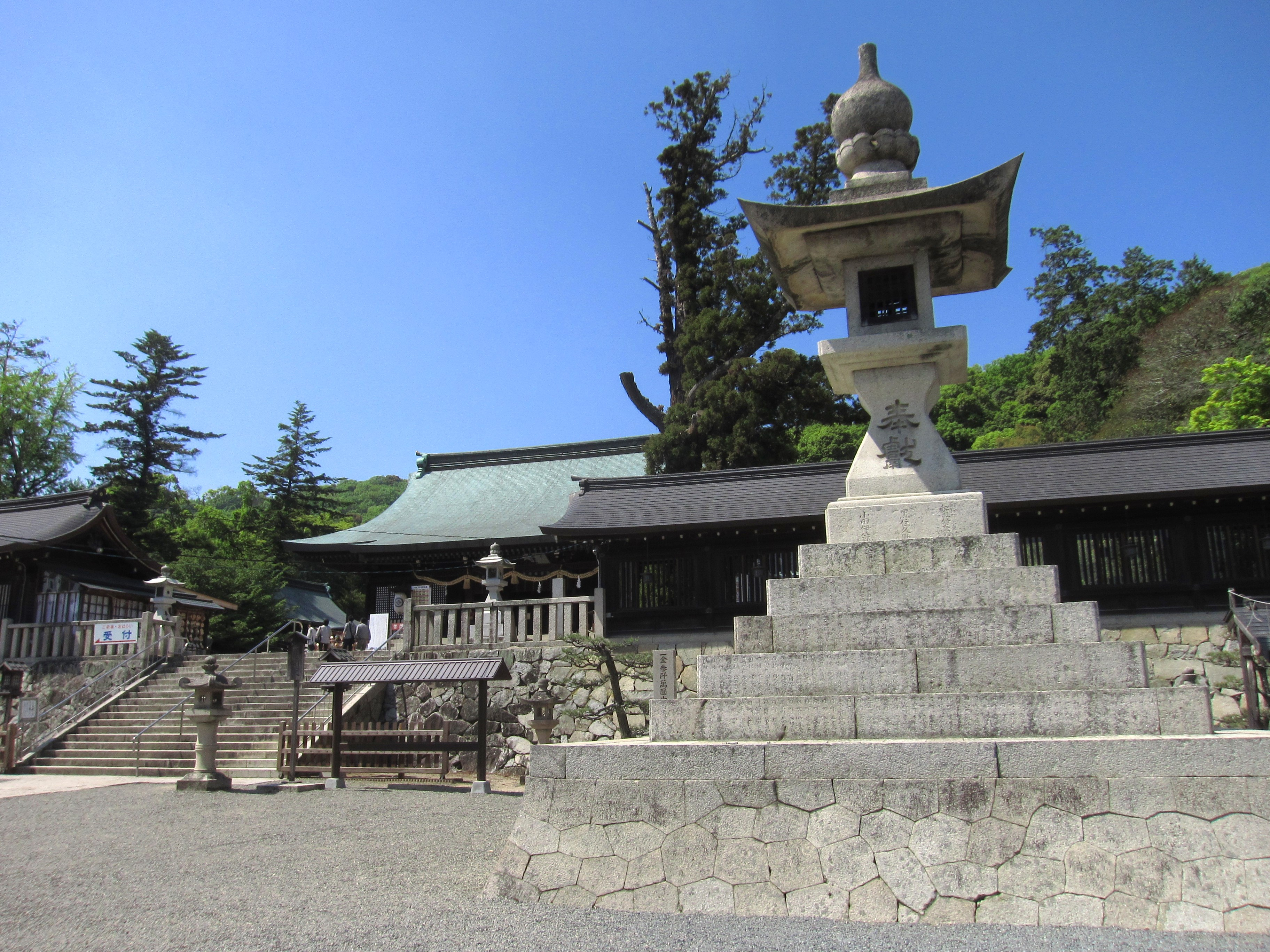 吉備津彦神社 大燈籠と拝殿